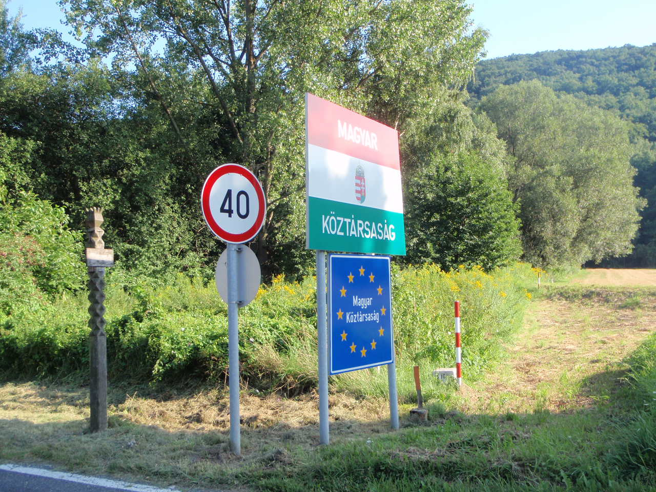 Güns, Grenzkorridor